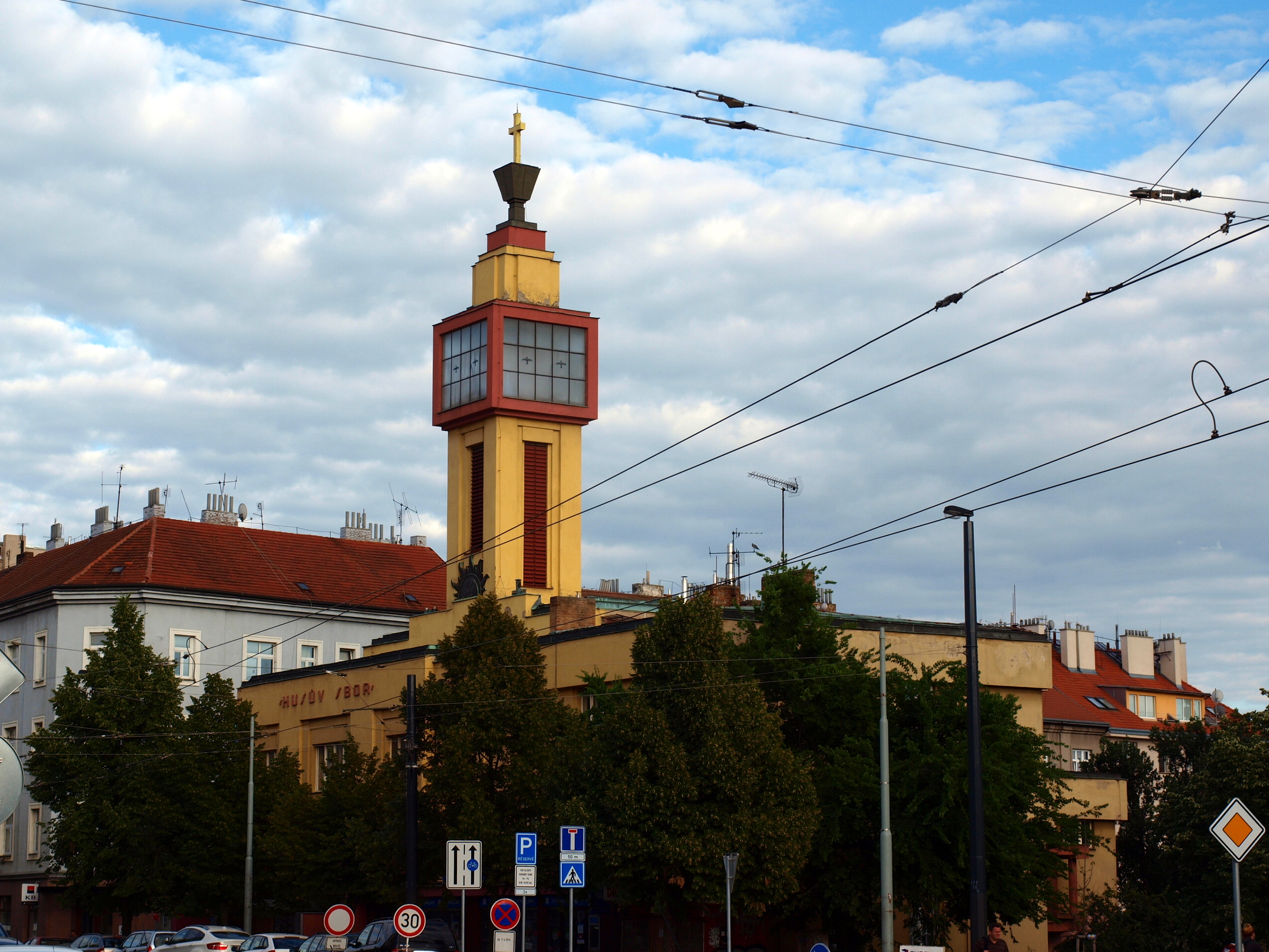 Husův sbor Praha-Vršovice